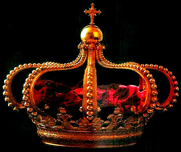 Coroa Real Fechada Portuguesa